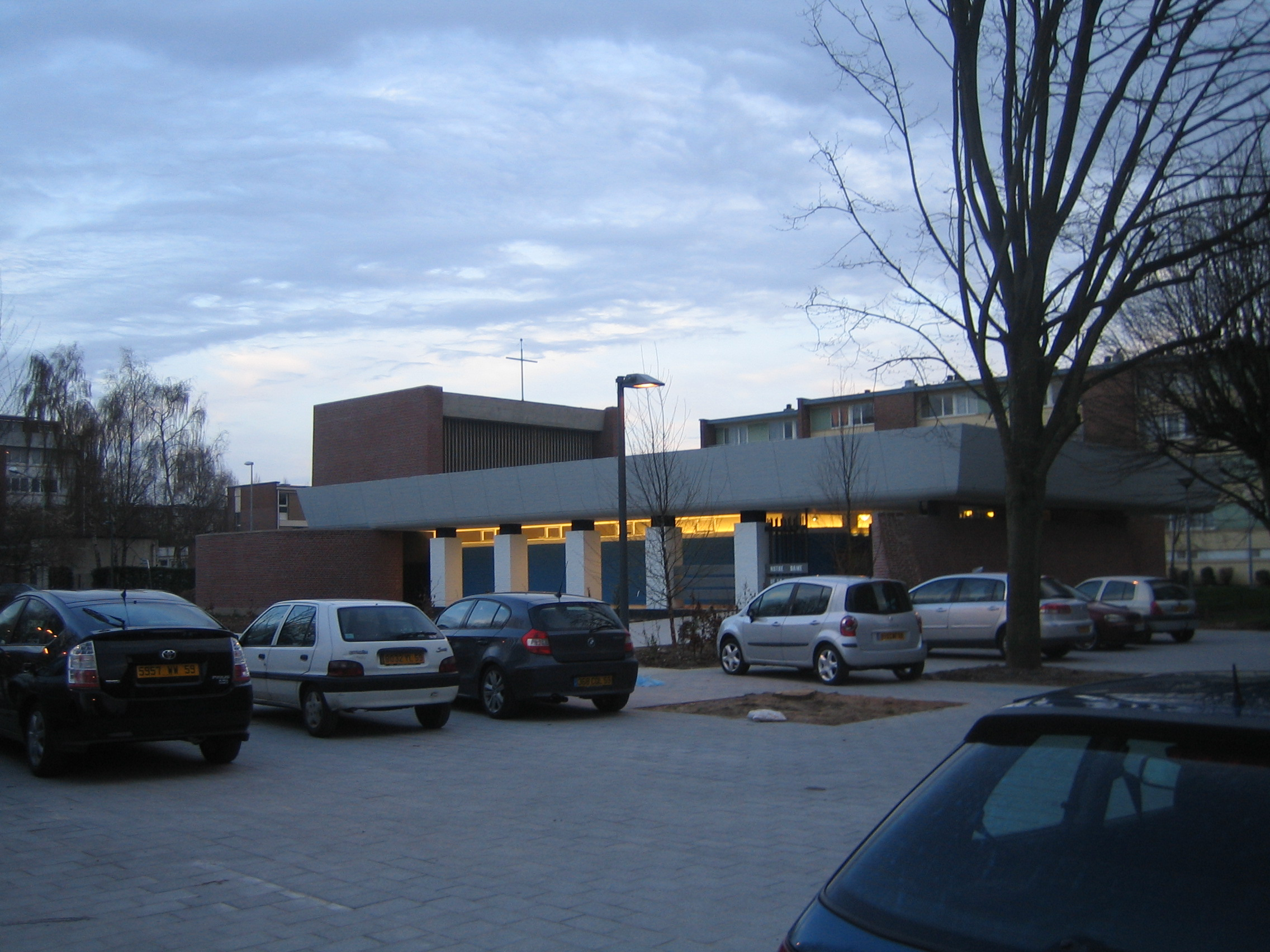 Eglise de la Nativité, à Villeneuve d'Ascq